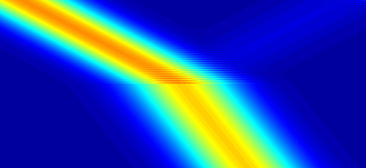 Simulation d'une réfraction d'un rayon lumineux réaliser avec le programme MOOSH.